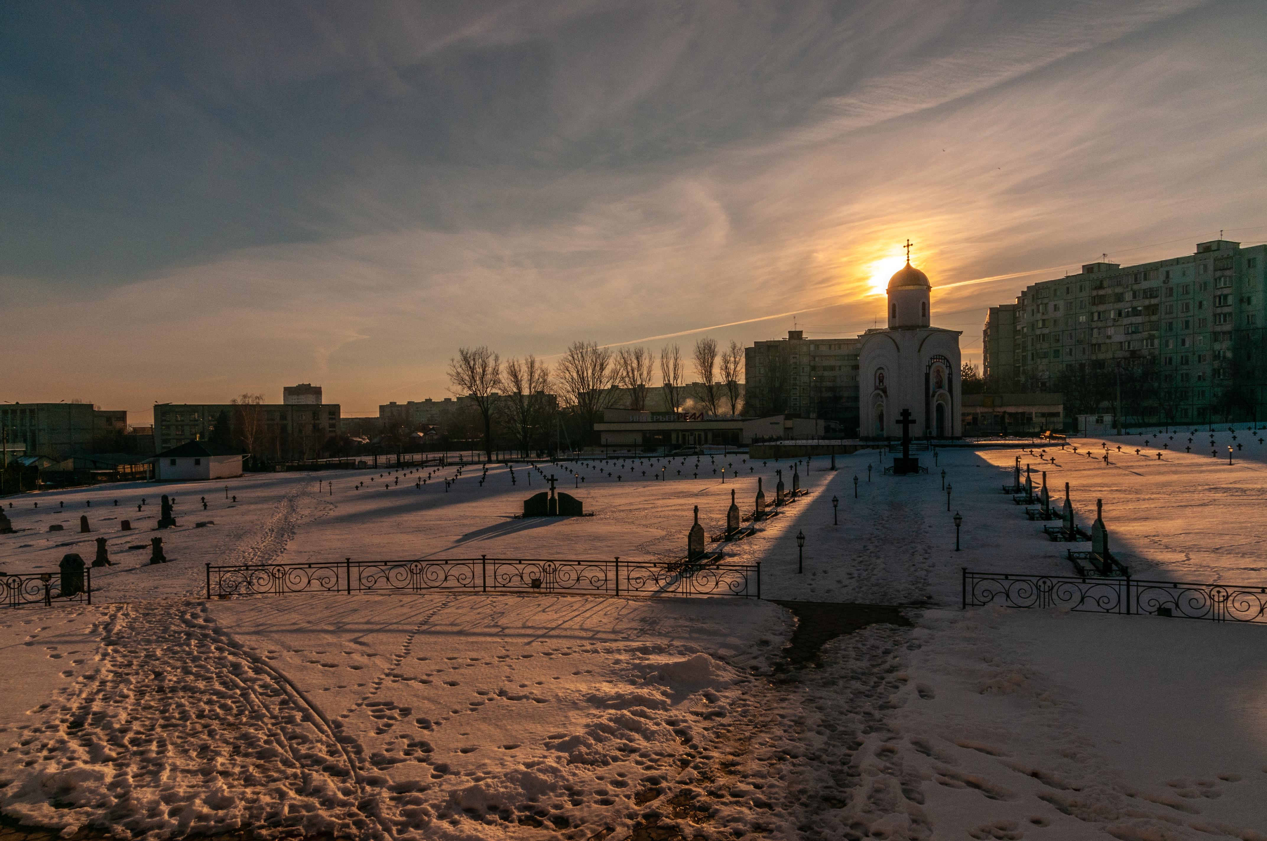 Bender, Pridnestrowien, Kriegerfriedhof von 1992 mit orthodoxer Kirche